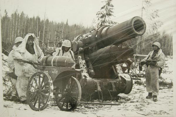 Бойцы Красной Армии у захваченной немецкой мортиры. 19 января 1944 года. После штурма Вороньей горы.